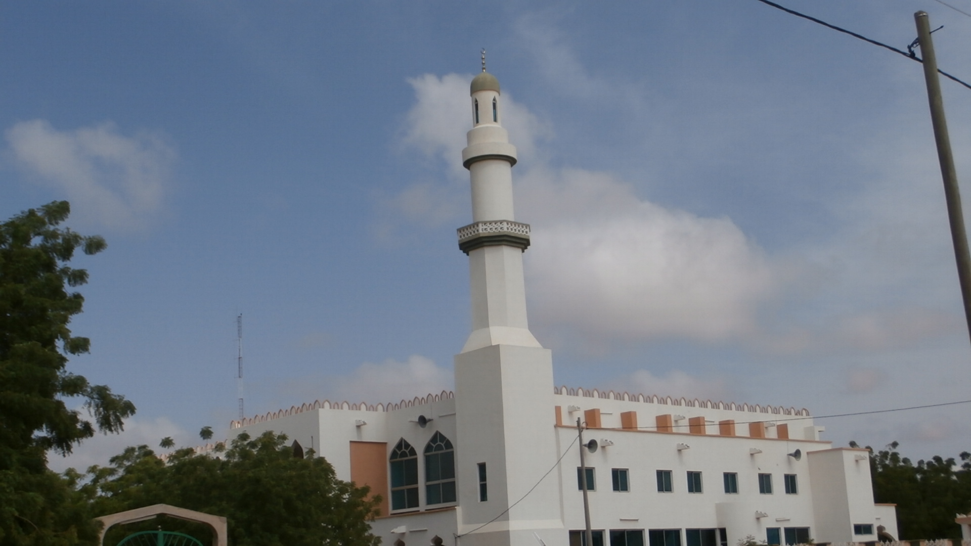 Mosqué de Zaria 2